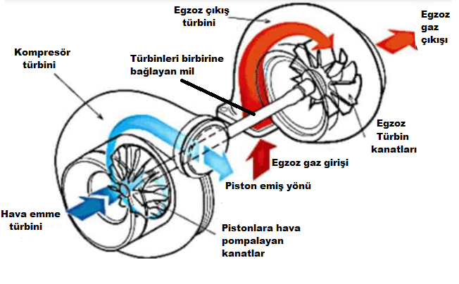 ddd